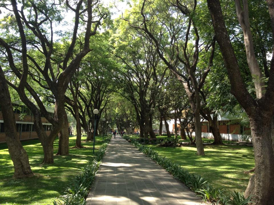 Cuenta con una gran variedad de arboles en todo el campus.